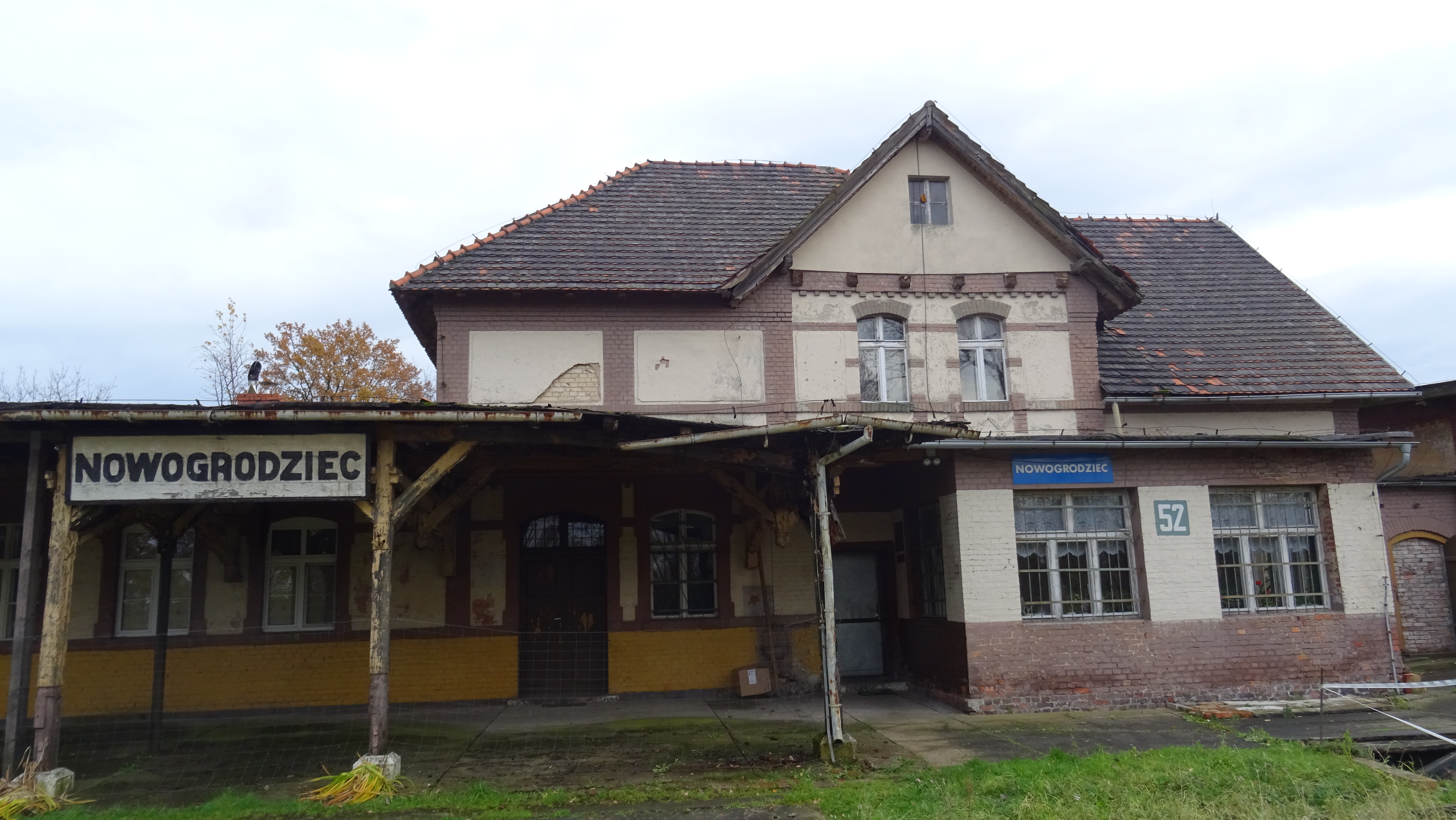 Dworzec w Nowogrodźcu.